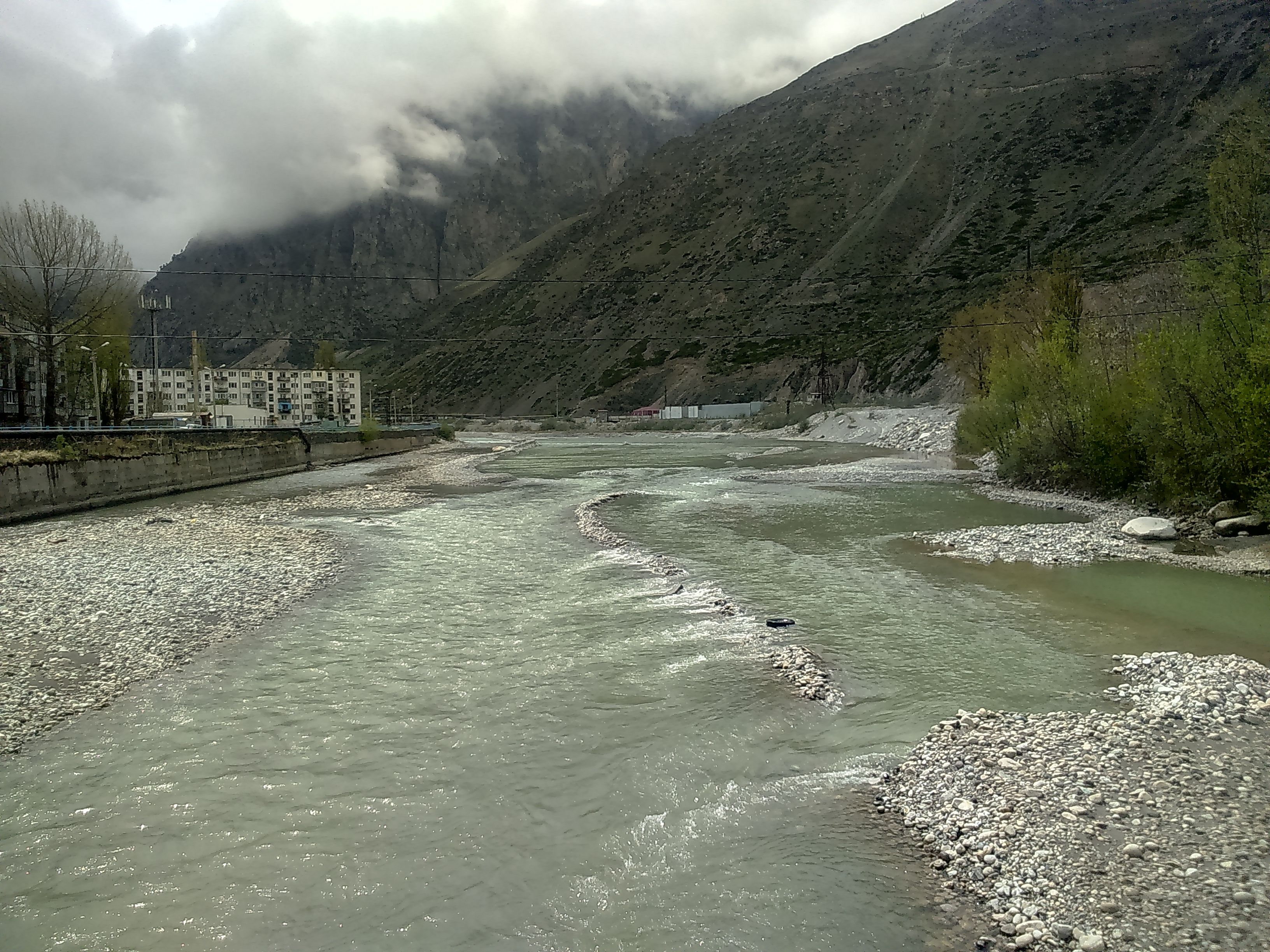 Река Баксан весной